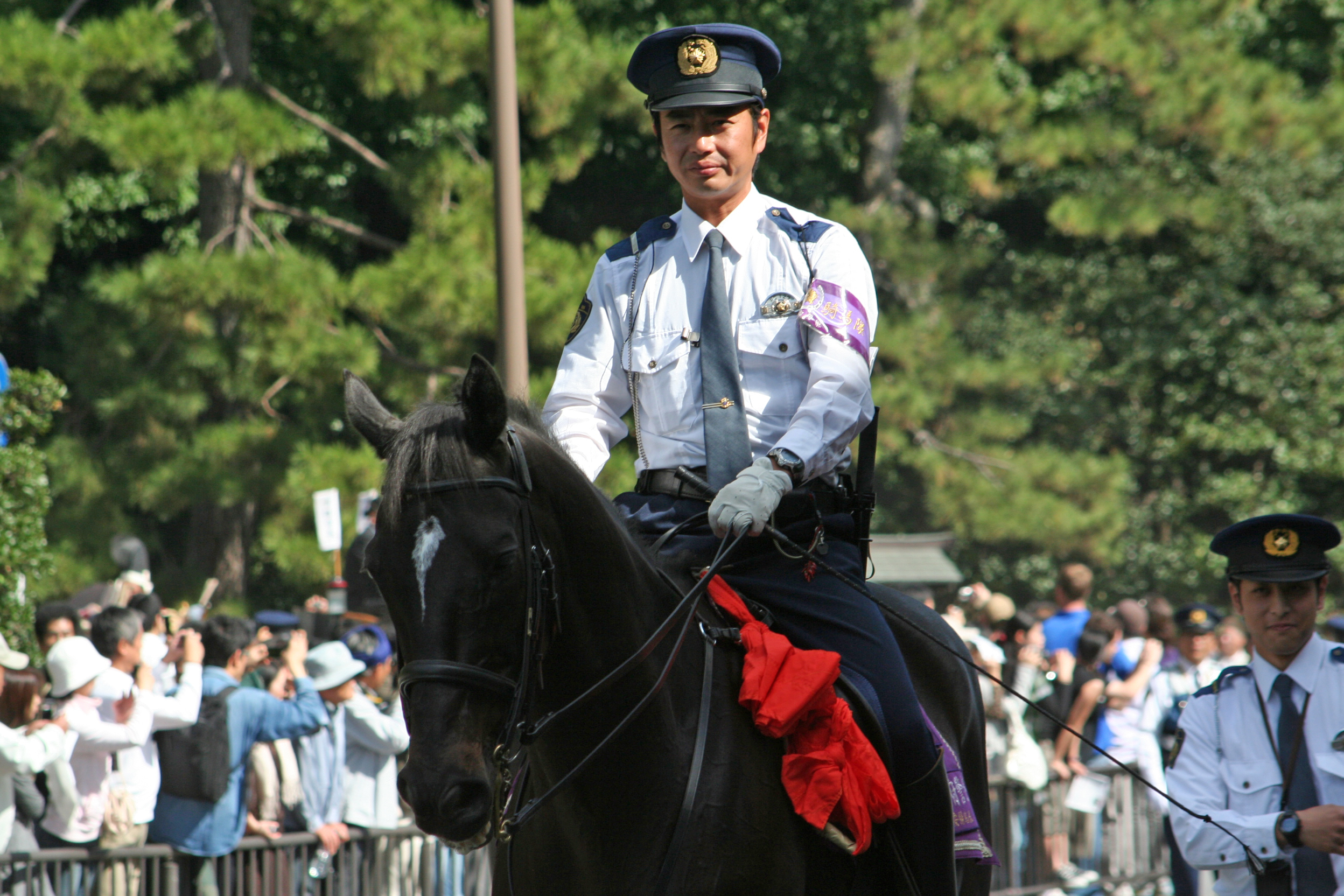 京都府京都市にて開催された時代祭。正午の御所から平安神宮までの行進の様子。2009年10月22日撮影。